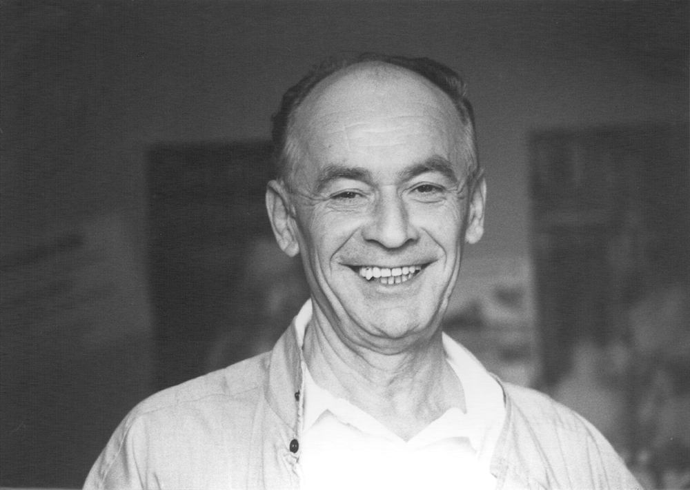 Der Hörspieldramaturg Wolfgang Beck (1933-1994) - hier im Jahr 1991 im Funkhaus Nalepastraße - auf einer Porträtaufnahme des Berliner Hörspiel-Fotografen Werner Bethsold (*1925)